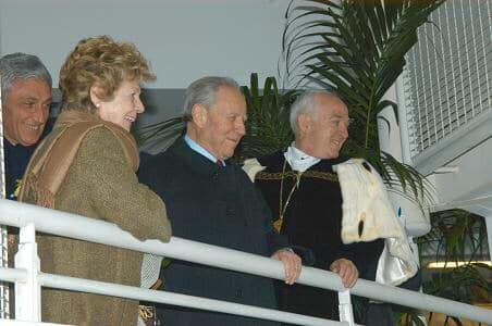 Il Presidente della Repubblica Carlo Azeglio Ciampi e consorte, il Rettore dell'Università degli Studi di Salerno RaimondoPasquino ed il Governatore della Regione Campania Antonio Bassolino in visita alla Biblioteca "E. R. Caianiello" (foto A. Ceccola)